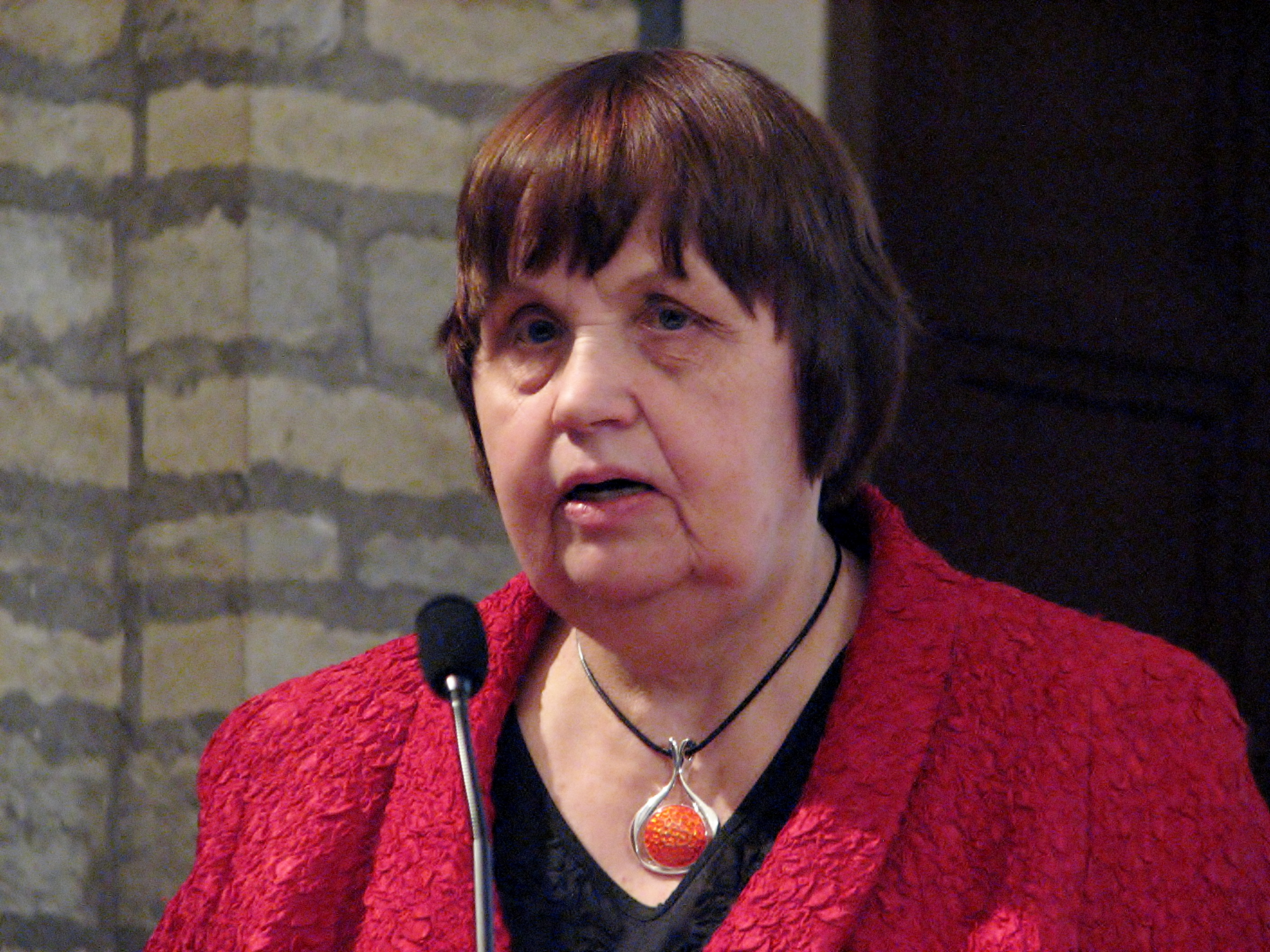 Rutt Enok Eesti Raamatukoguhoidjate Ühingu aastapreemia 2013 saamisel